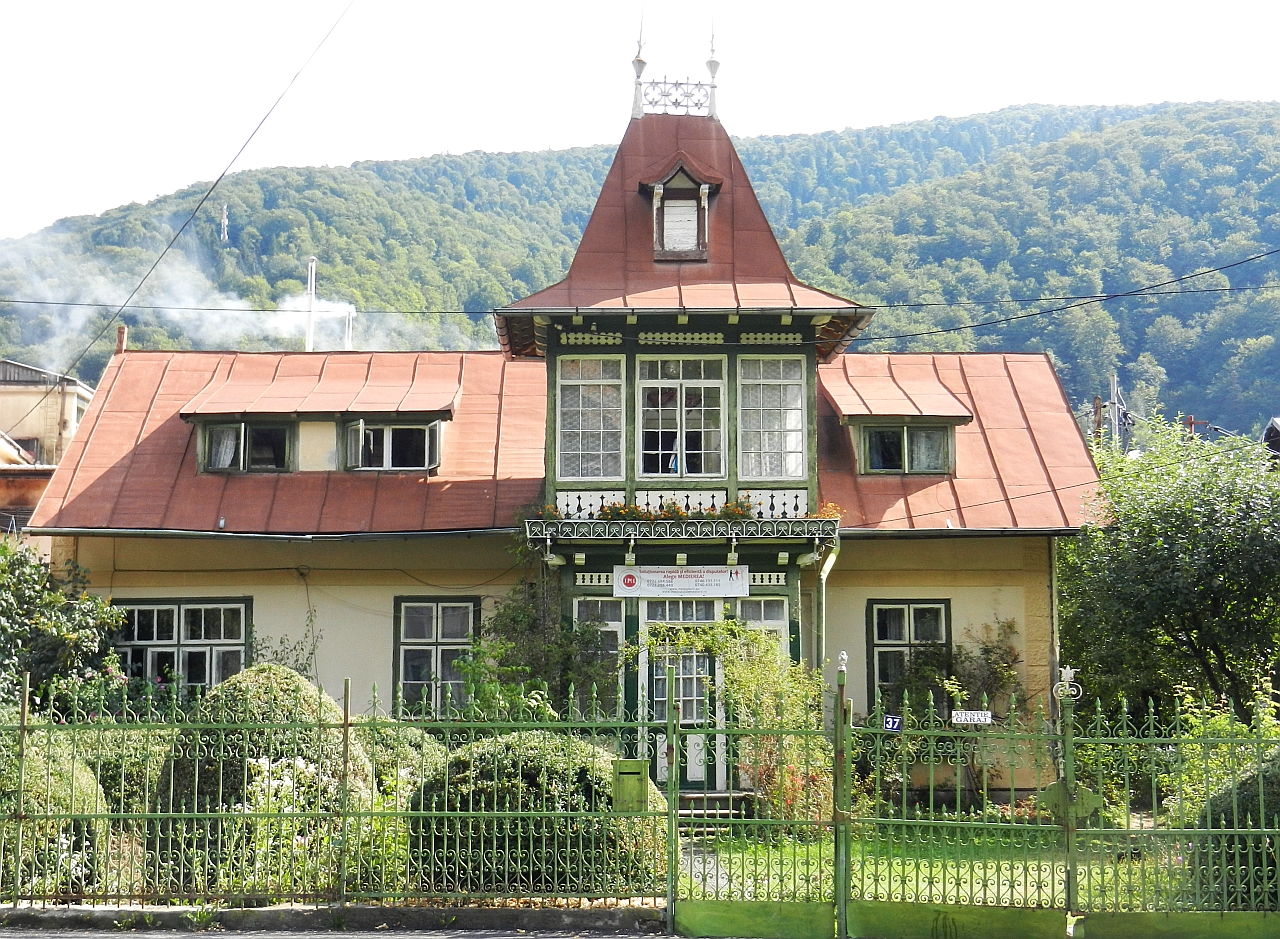 Casa Doina Marian